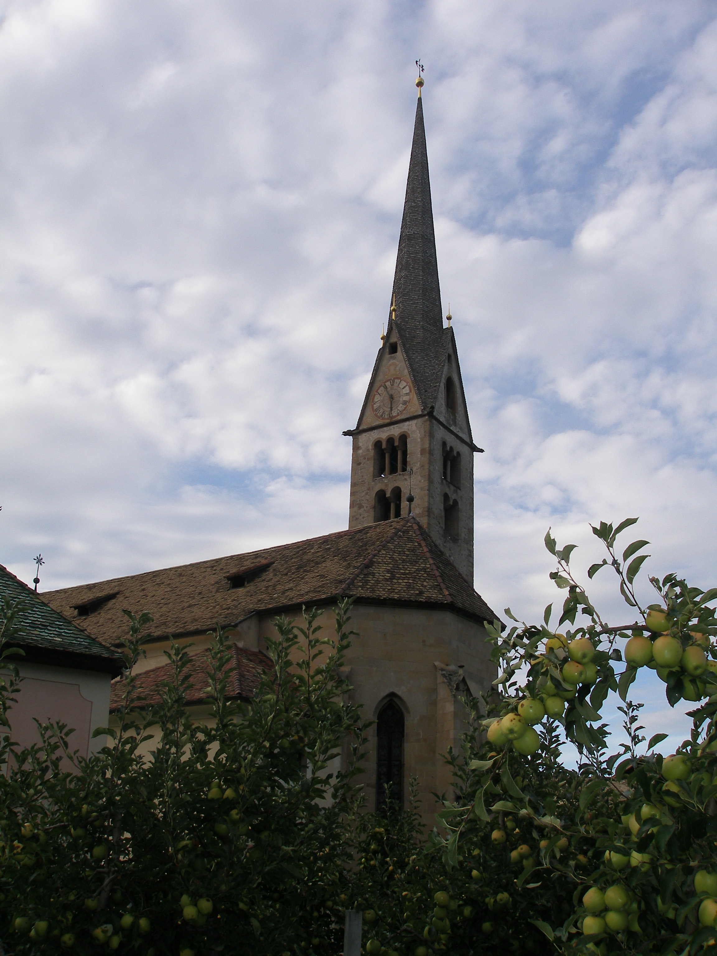 Pfarrkirche St. Nikolaus in Neumarkt (Südtirol)